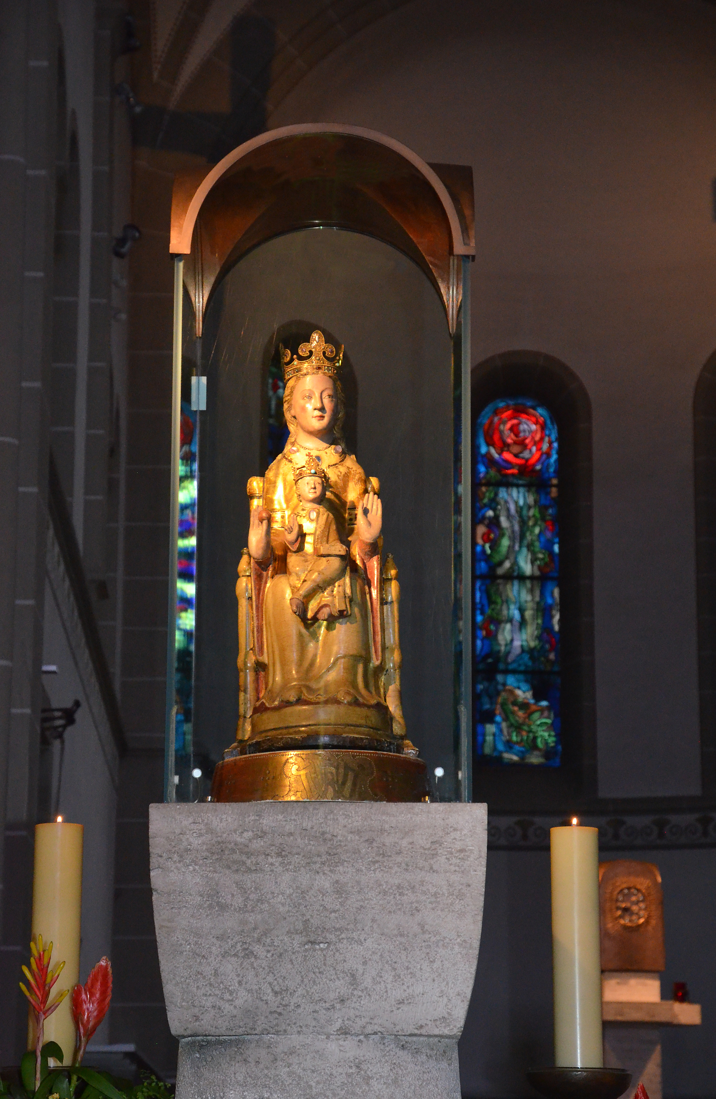 Am 1. November 1661 wurde das Gnadenbild in einer feierlichen Prozession von Soest aus der Wiesenkirche nach Werl gebracht und durch Erzbischof Maximilian Heinrich von Köln den Kapuzinern übergeben.